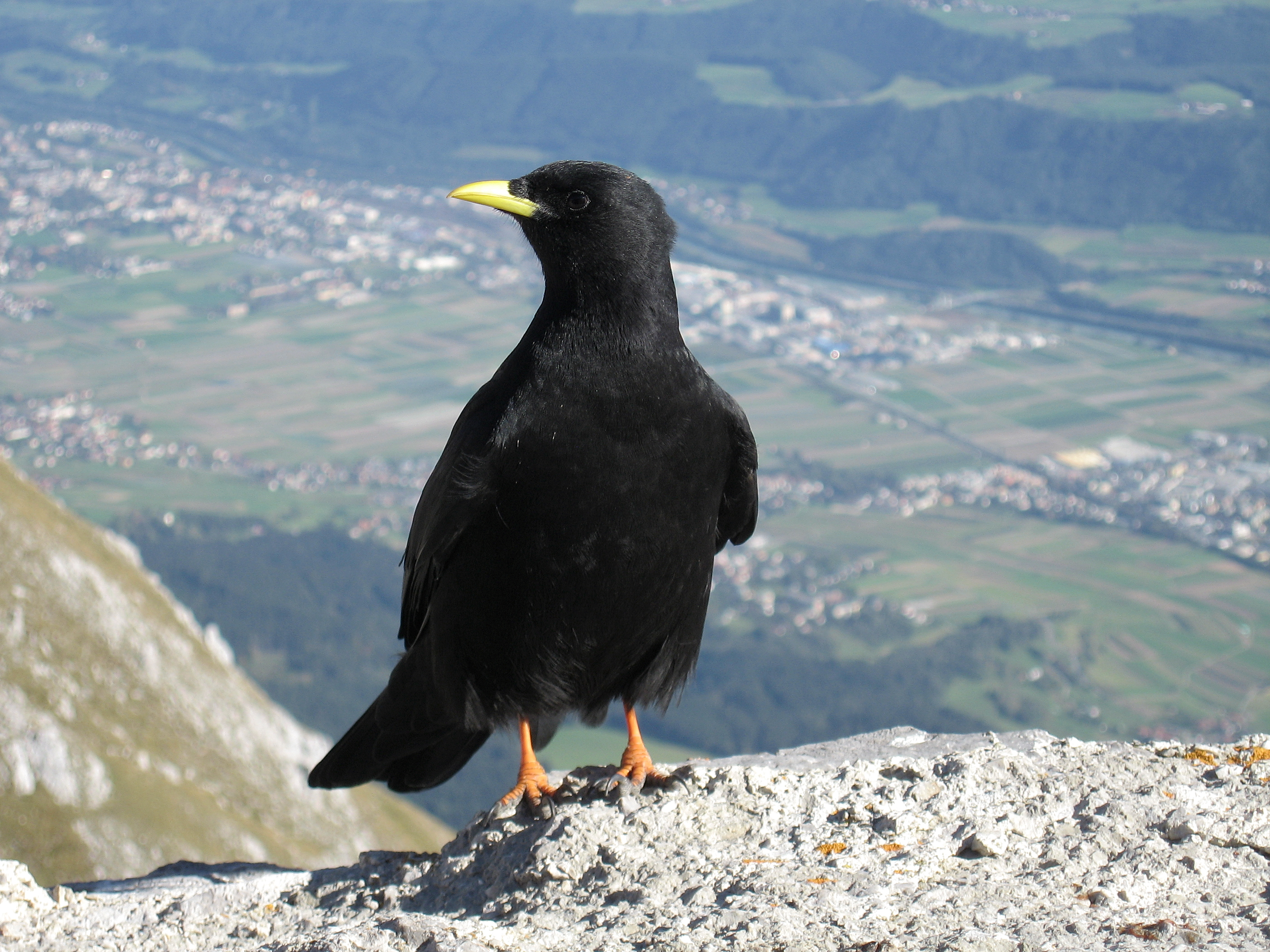 Österreich, Innsbruck, Alpendohle (pyrrhocorax graculus), Hafelekar, im Hintergrund das Inntal